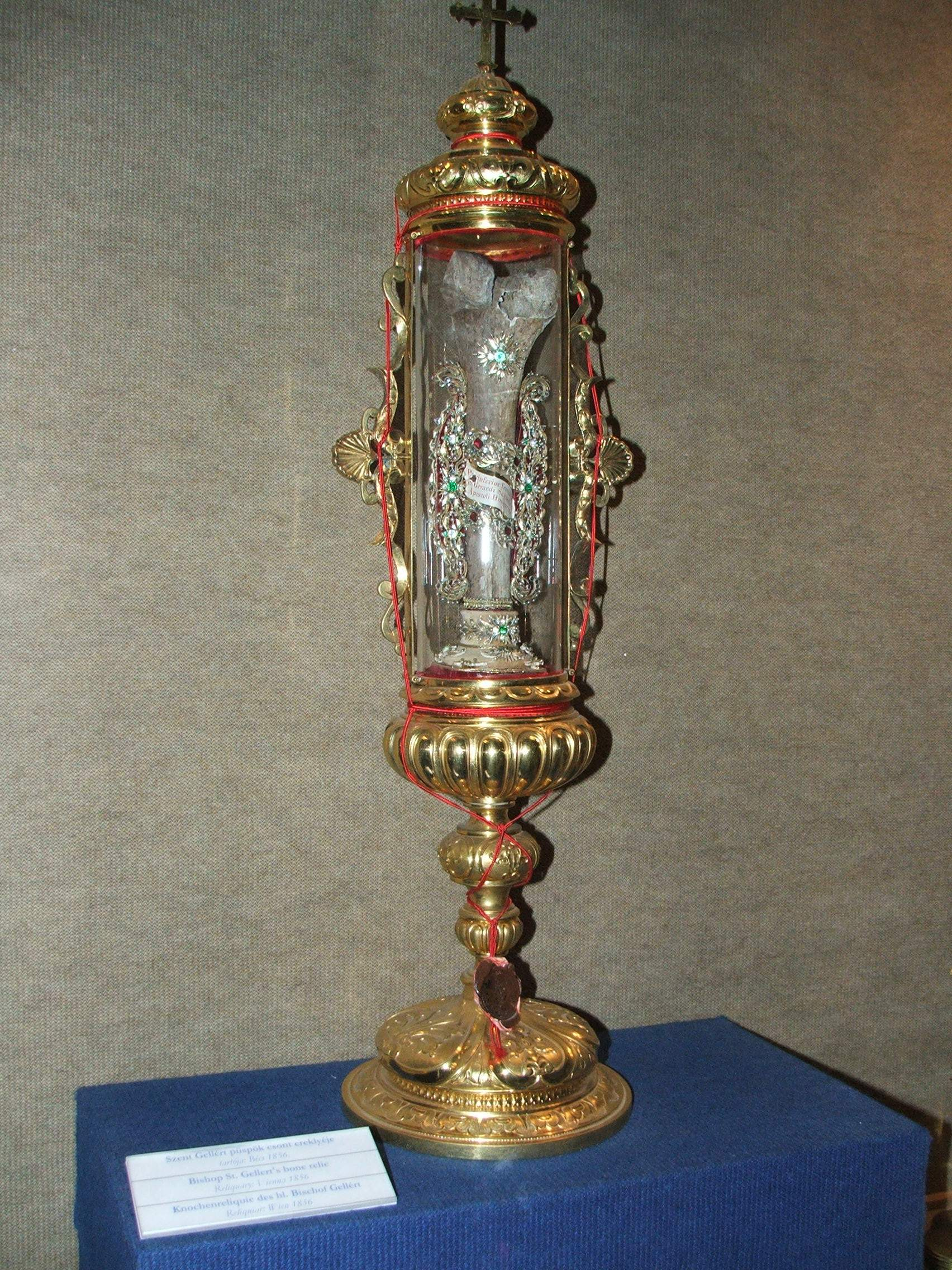 Szent Gellért ereklyéje, Esztergom